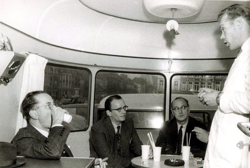 Burgemeester Willem baron Michiels van Kessenich nuttigt een beker melk in de mobiele melkbar van het Nederlands Zuivelbureau op de Markt in Maastricht. Naast hem: dr. Charles Thewissen en B. Delamarre. Fotocollectie RHCL Maastricht, GAM 23368.